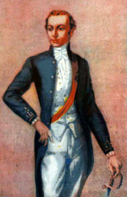 Francisco Casimiro Marcó del Pont Díaz Ángel y Méndez (Vigo, España; 1770 - † Luján, Argentina; 1819), hijo de Buenaventura Marcó del Pont y Juana Ángel y Méndez, fue un militar español y gobernador de la Corona Española en Chile. Es una de las figura de la Independencia de Chile dado que fue el último de los Gobernadores de Chile cuando fue hecho prisionero por fuerzas del Ejercito de los Andes, lideradas por José de San Martín y Bernardo O'Higgins que ingresaron a Santiago luego de la Batalla de Chacabuco.